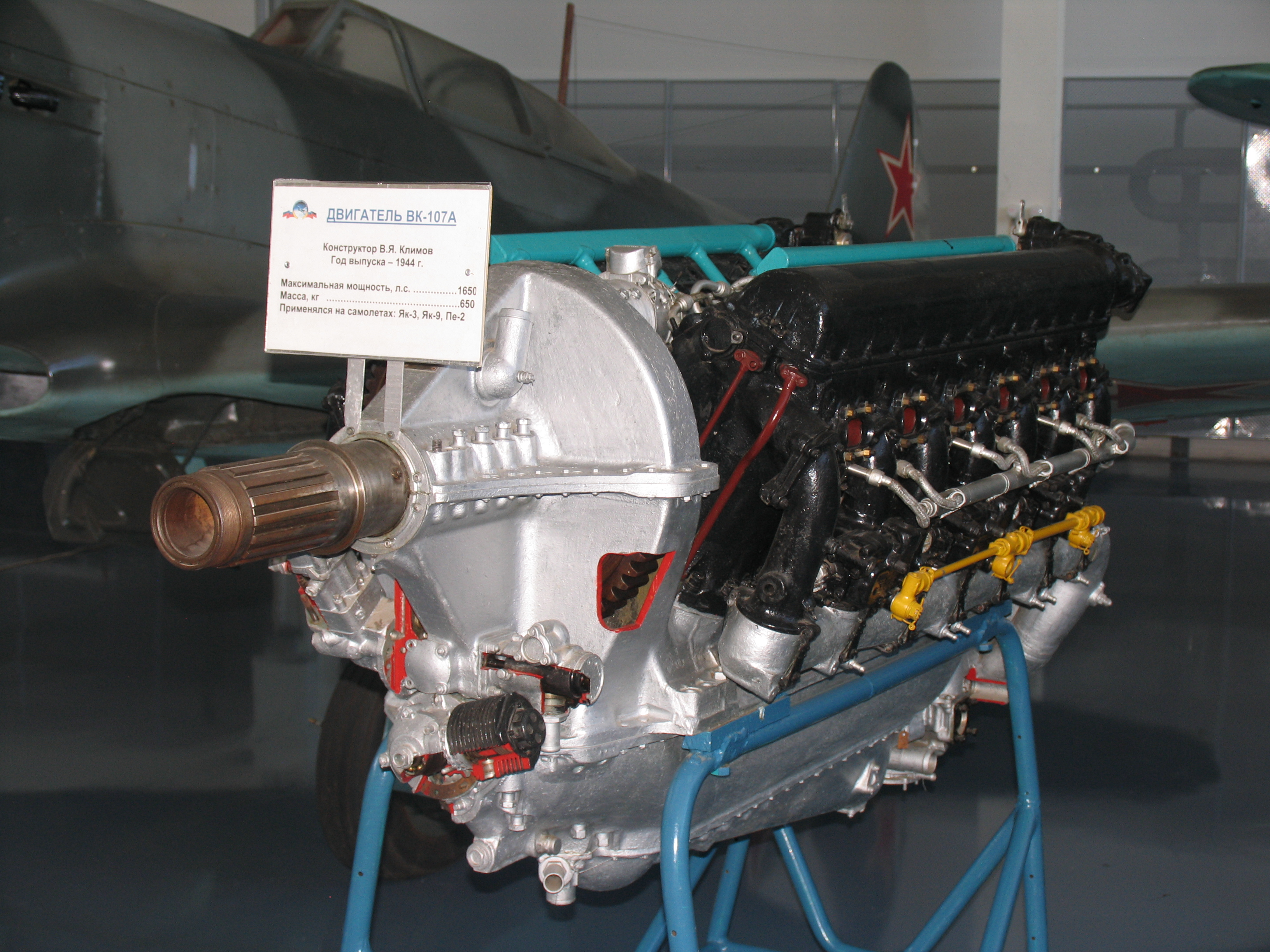 Двигатель ВК-107А (М-107А). Музей ВВС.